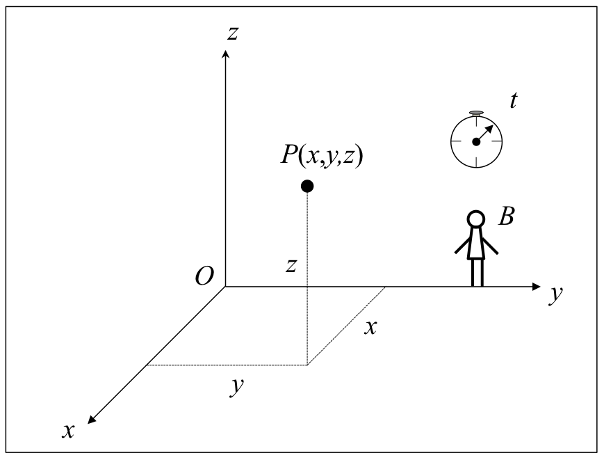 Erreferentzia-sistemako behatzailea, ardatz koordenatuak, P puntuko koordenatuak eta erlojua.